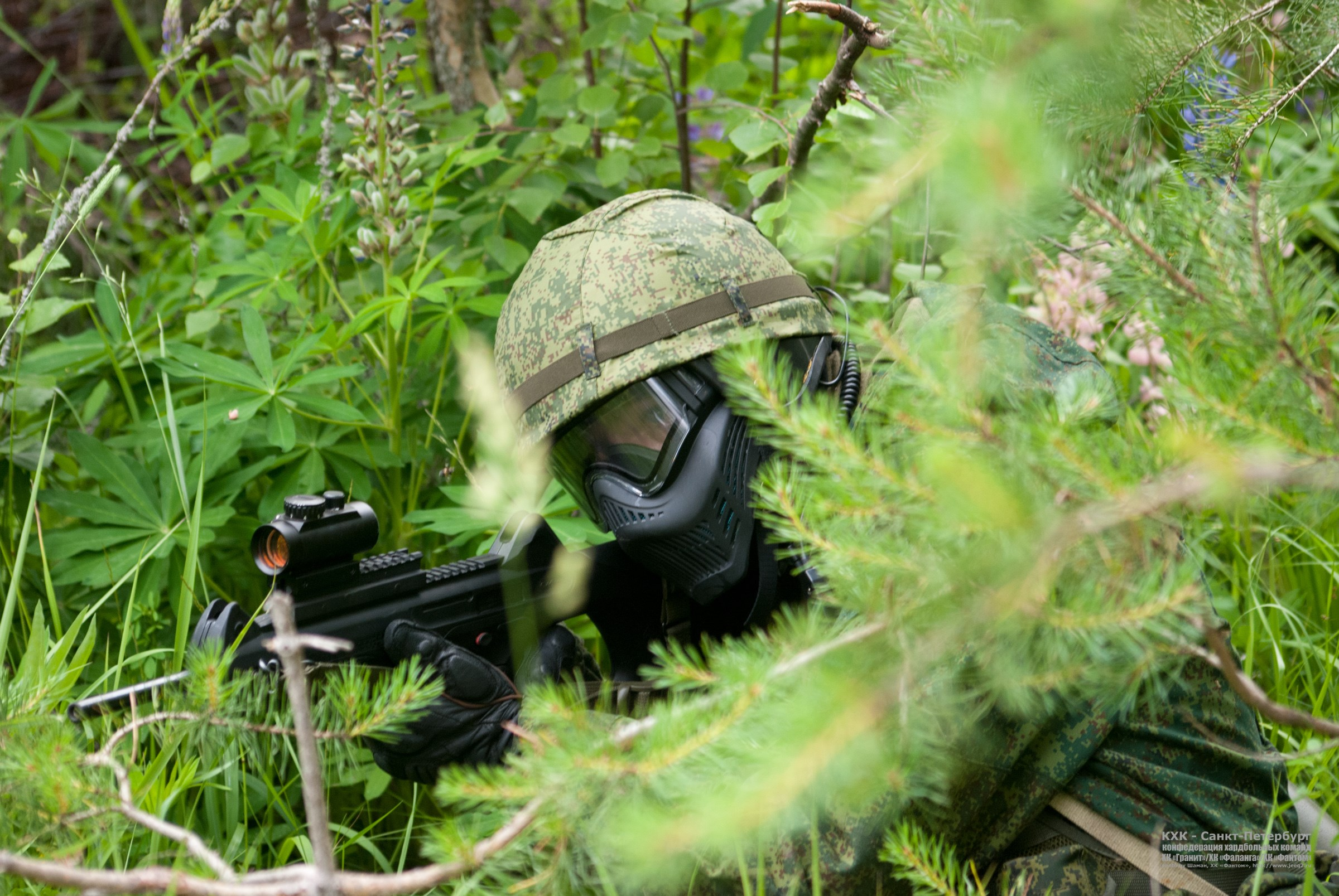 Эпизод игры "Вторжение" Санкт-Петербург, 2013 год. Боец команды "Гранит". Оружие Umarex Beretta Cx-4 Storm, маска пейнтбольная (усиленная) V-Force